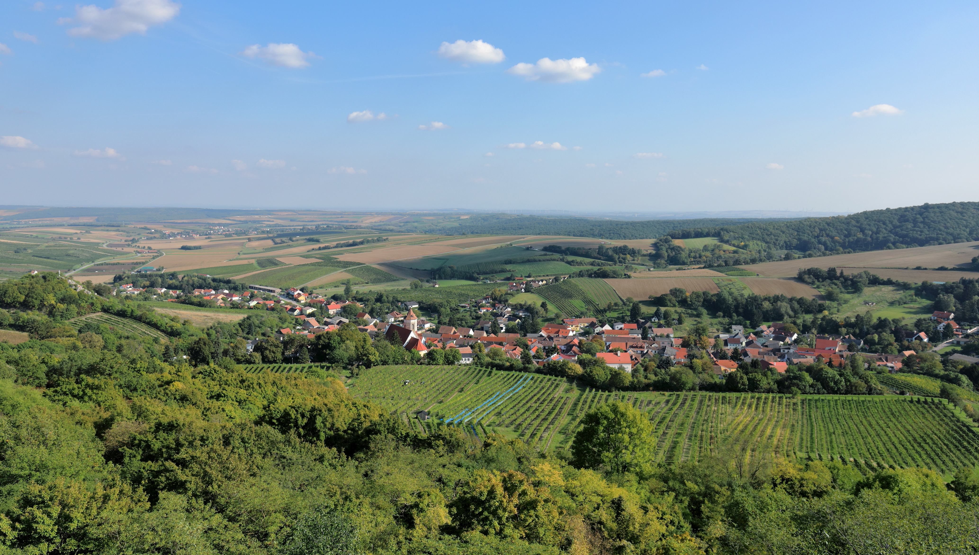 Nordwestansicht der niederösterreichischen Marktgemeinde Falkenstein bzw. Blick von der Burg Falkenstein auf den Ort Falkenstein mit dem Kalvarienberg ganz links. Der Weinhauerort im nördlichen Weinviertel und in einer Talsenke südlich der Falkensteiner Berge erhielt urkundlich 1513 das Marktrecht. Die Burg und die Pfarre wurden um 1050 errichtet.